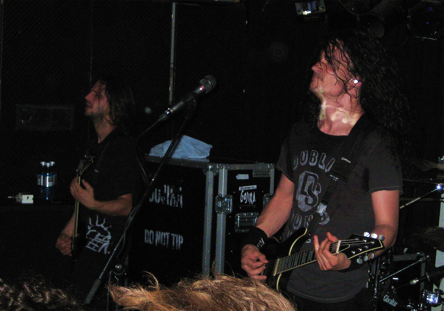 Gojira live @ Nachtleben, Frankfurt/Main